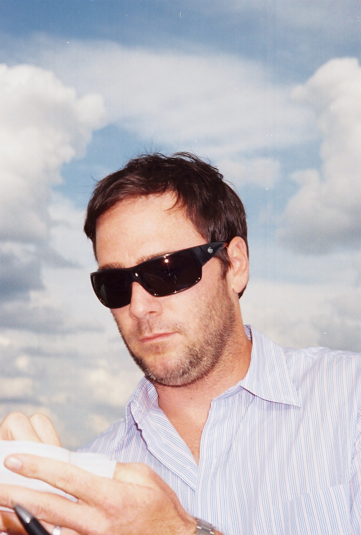 Talladega, AL 4-08 Talladega Race